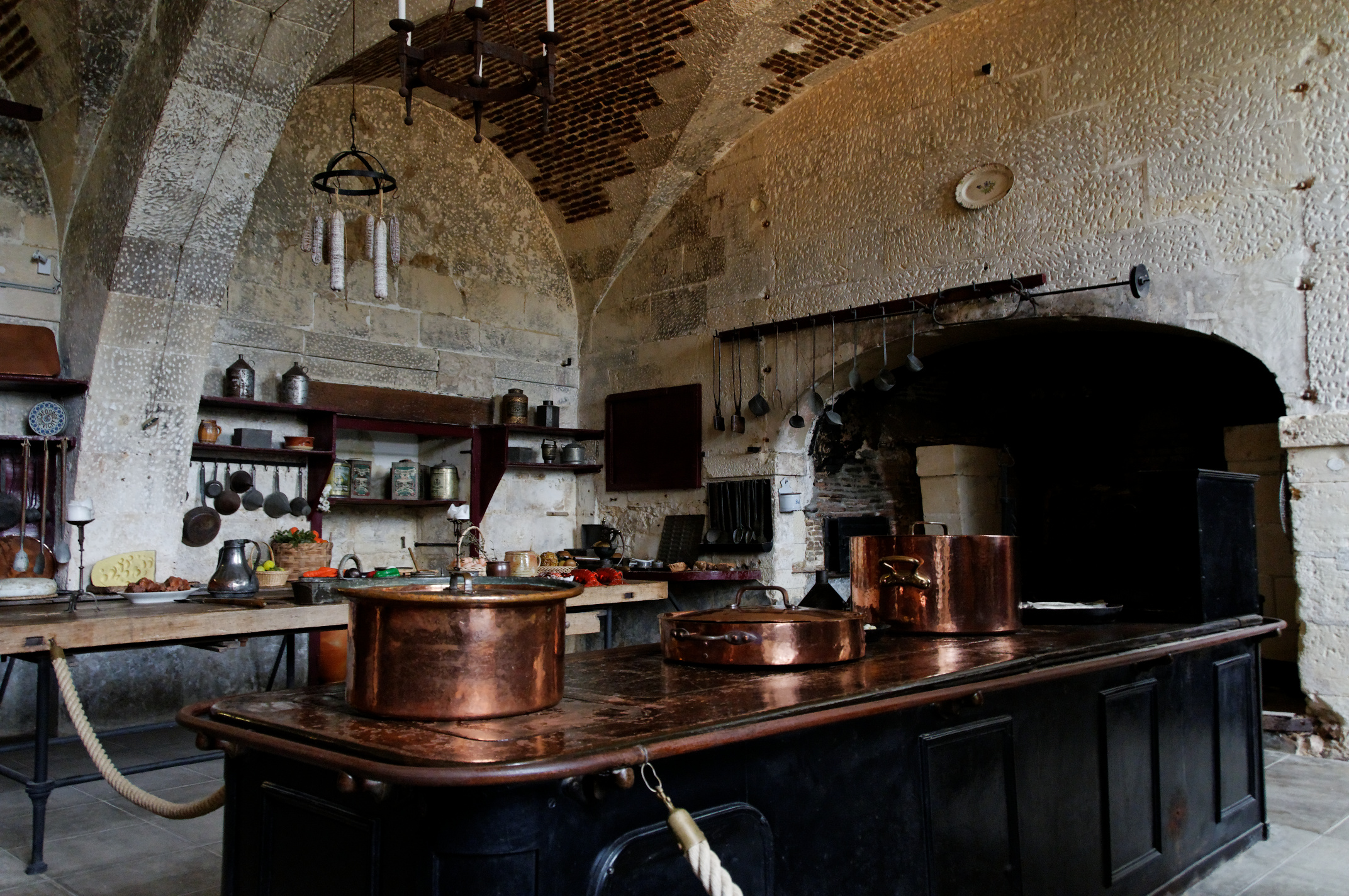 Château de Valençay, la Grande cuisine, Valençay, Indre, France